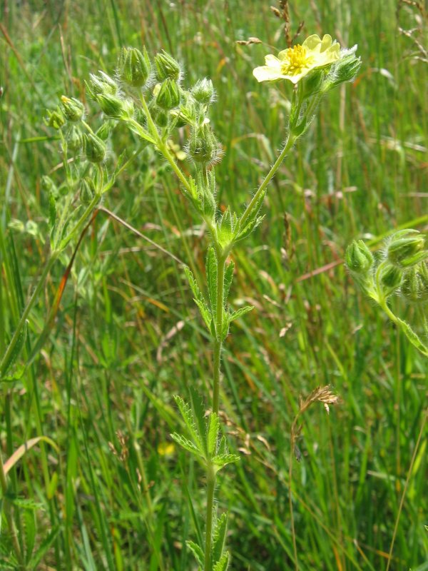 Aufrechtes Fingerkraut Potentilla recta, Müritz-Gebiet